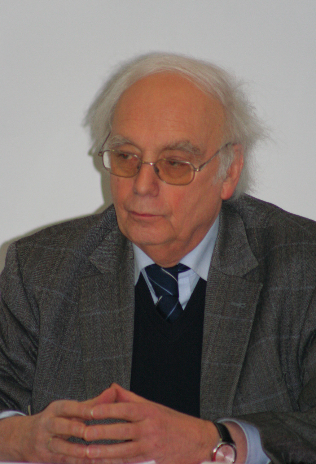 Historiker Bernd Faulenbach bei einem Vortrag in Düsseldorf. Januar 2010